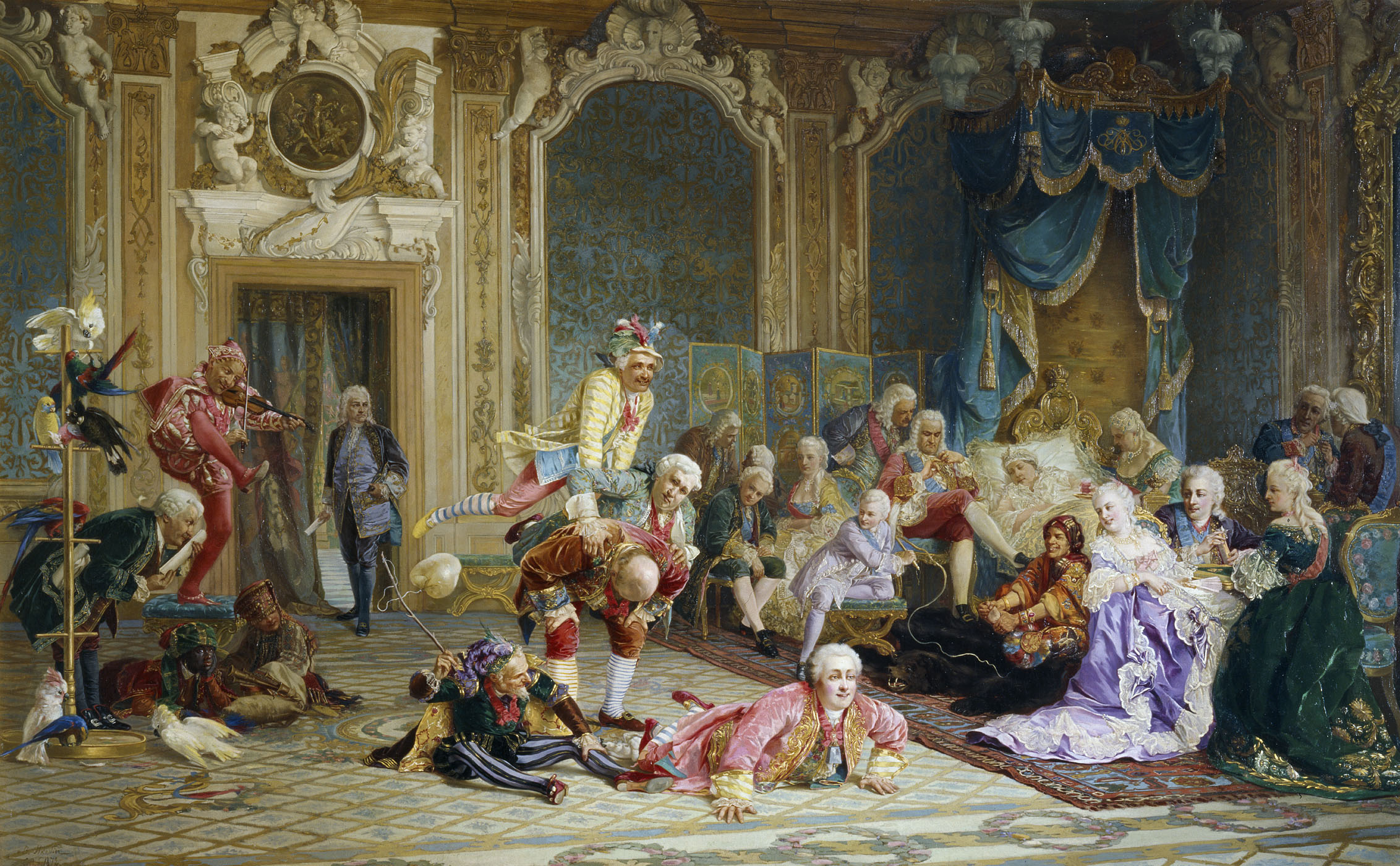 Валерий Иванович Якоби (1834-1902) «Шуты при дворе императрицы Анны Иоанновны» Композиция включает 26 фигур: собравшихся в спальне недомогающей императрицы Бирона (сидит у ее изголовья) и придворных стараются развеселить шуты, играющие в чехарду. Это М.А. Голицын (стоит согнувшись) и Н.Ф. Волконский (вскочил на него), А.М. Апраксин (растянулся на полу), шут Балакирев (возвышается над всеми), Педрилло (со скрипкой) и д'Акоста (с бичом). У кровати - графиня Бирон, за столом играют в карты статс-дама Н.Ф. Лопухина, ее фаворит граф Левенвольде и герцогиня Гессен-Гомбургская, позади них - граф Миних и князь Н. Трубецкой. Подле Бирона - его сын с бичом и начальник Тайной канцелярии А.И. Ушаков. Рядом сидят - будущая правительница Анна Леопольдовна, французский посол де Шатарди и лейб-медик Лесток. На полу, возле постели - карлица-шутиха калмычка Буженинова. В стороне у насеста с попугаями - поэт В.К. Тредиаковский. У входа - с негодованием взирает кабинет-министр А. Волынский